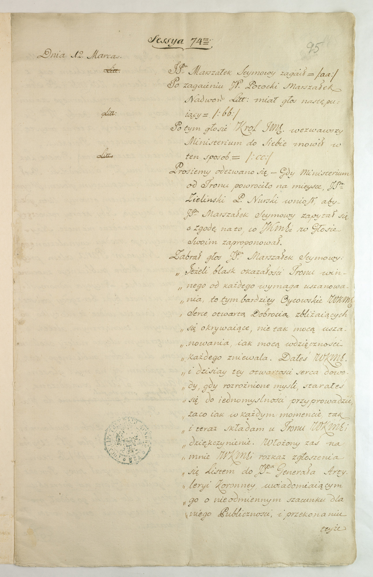 Przykładowa strona z rękopiśmiennego diariusza Sejmu Czteroletniego z 12 marca 1789 roku. Cała księga liczy 744 karty i obejmuje sesje 72 – 97 z 1789 r.